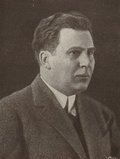 Kubín Jaroslav Kristian (1886-1937), český malíř, sochař a ilustrátor.